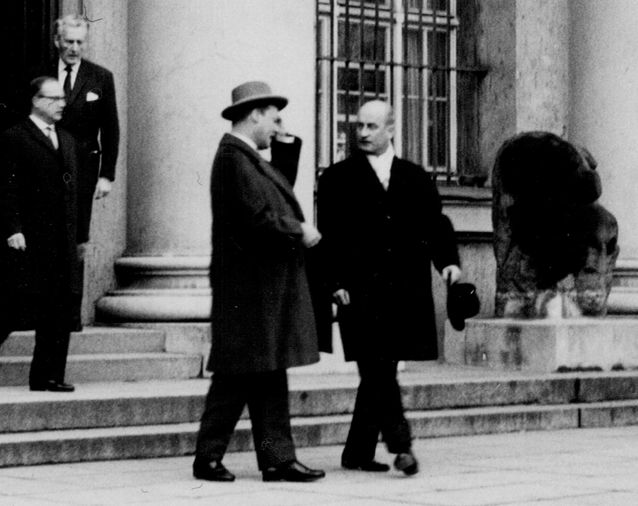 Willy Brandt und Hans-Georg Wormit (1912-1992) verabschieden sich vor dem Museum Dahlem, 1961